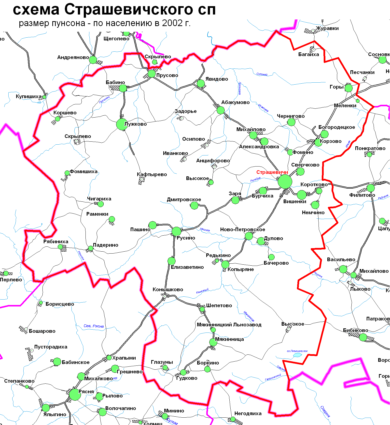 Схема Страшевичского СП Торжокского р-на